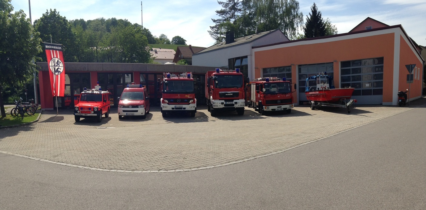 Freiwillige Feuerwehr Wörth Donau Stützpunktfeuerwehr 2015